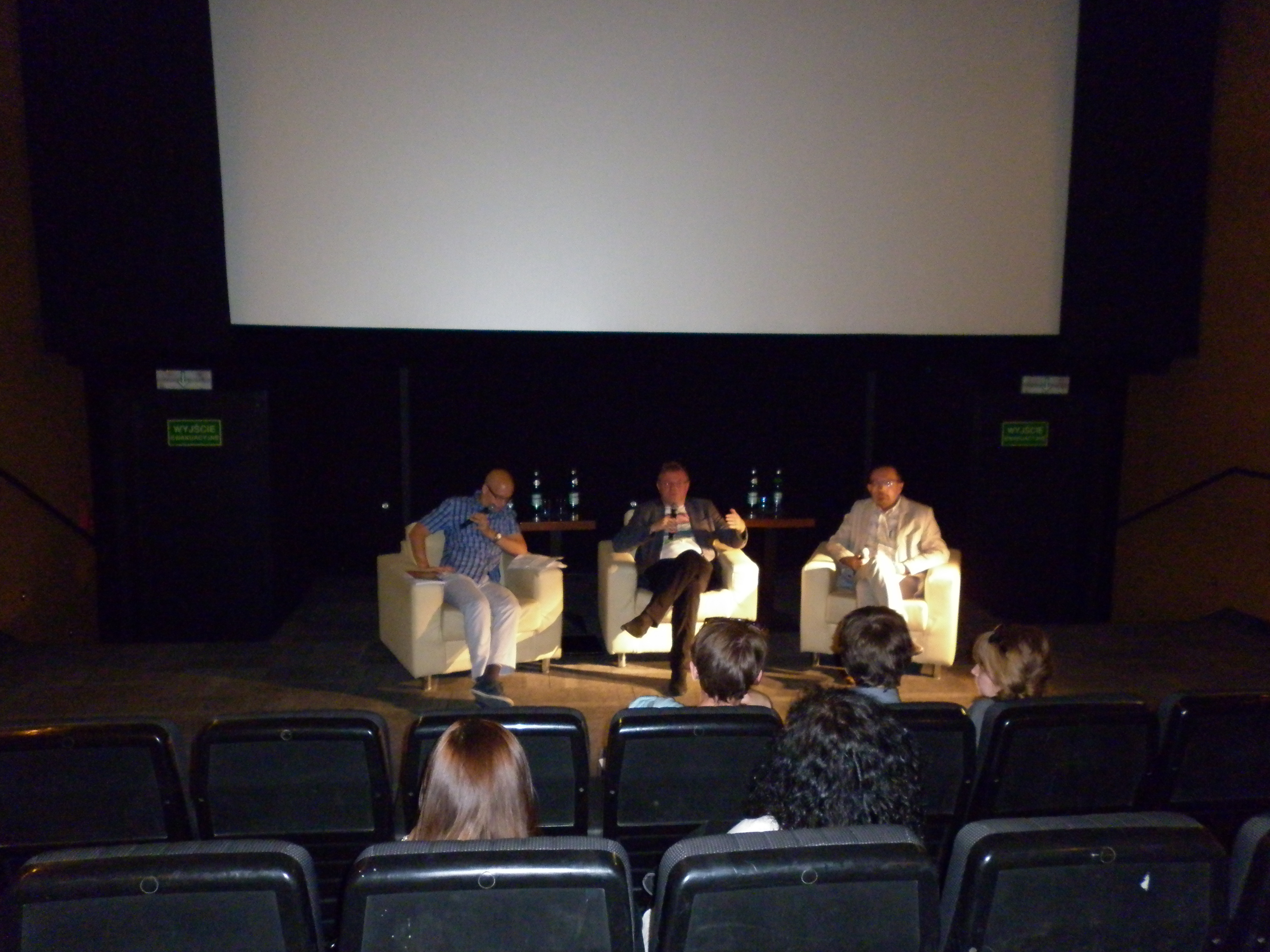 W środku Waldemar Dziak (politolog, dziennikarz), po prawej Andrzej Fidyk (reżyser).